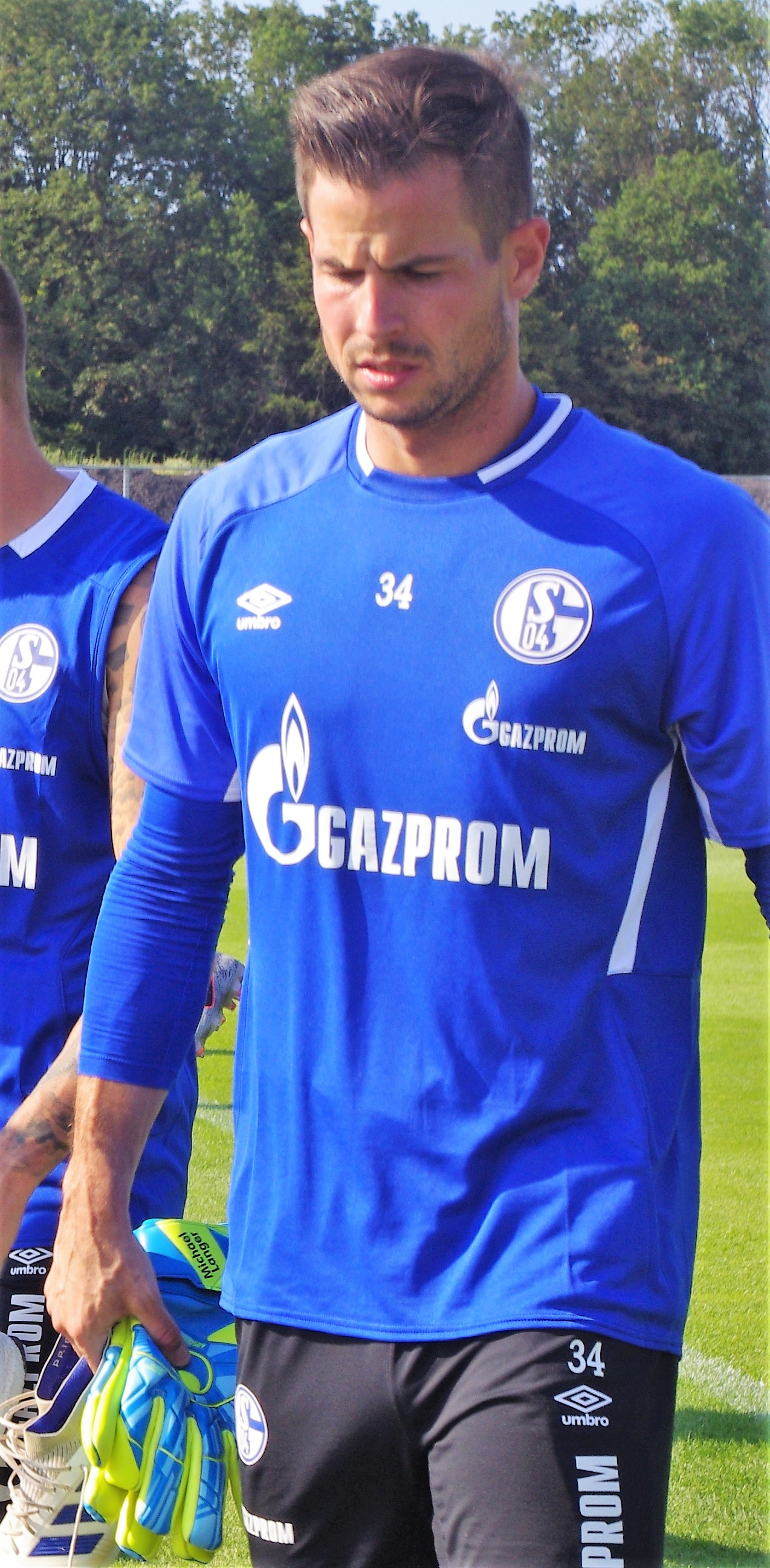 Michael Langer